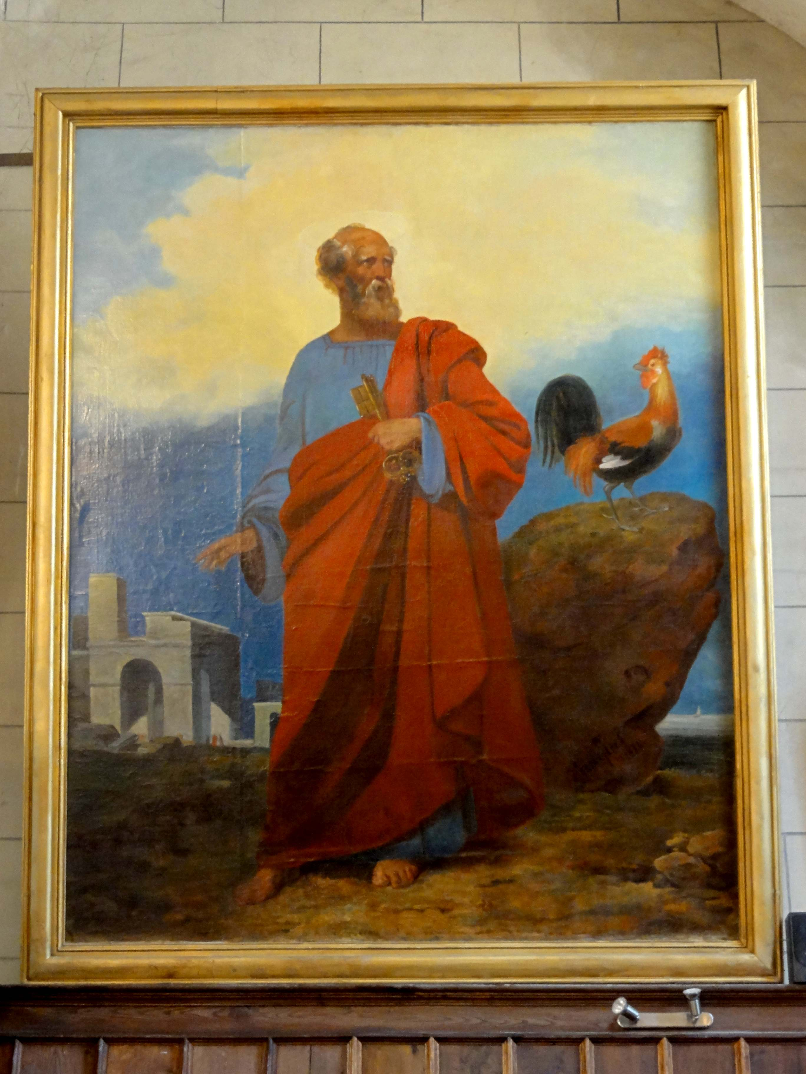 Tableau - le reniement de saint Pierre, XIXe siècle.